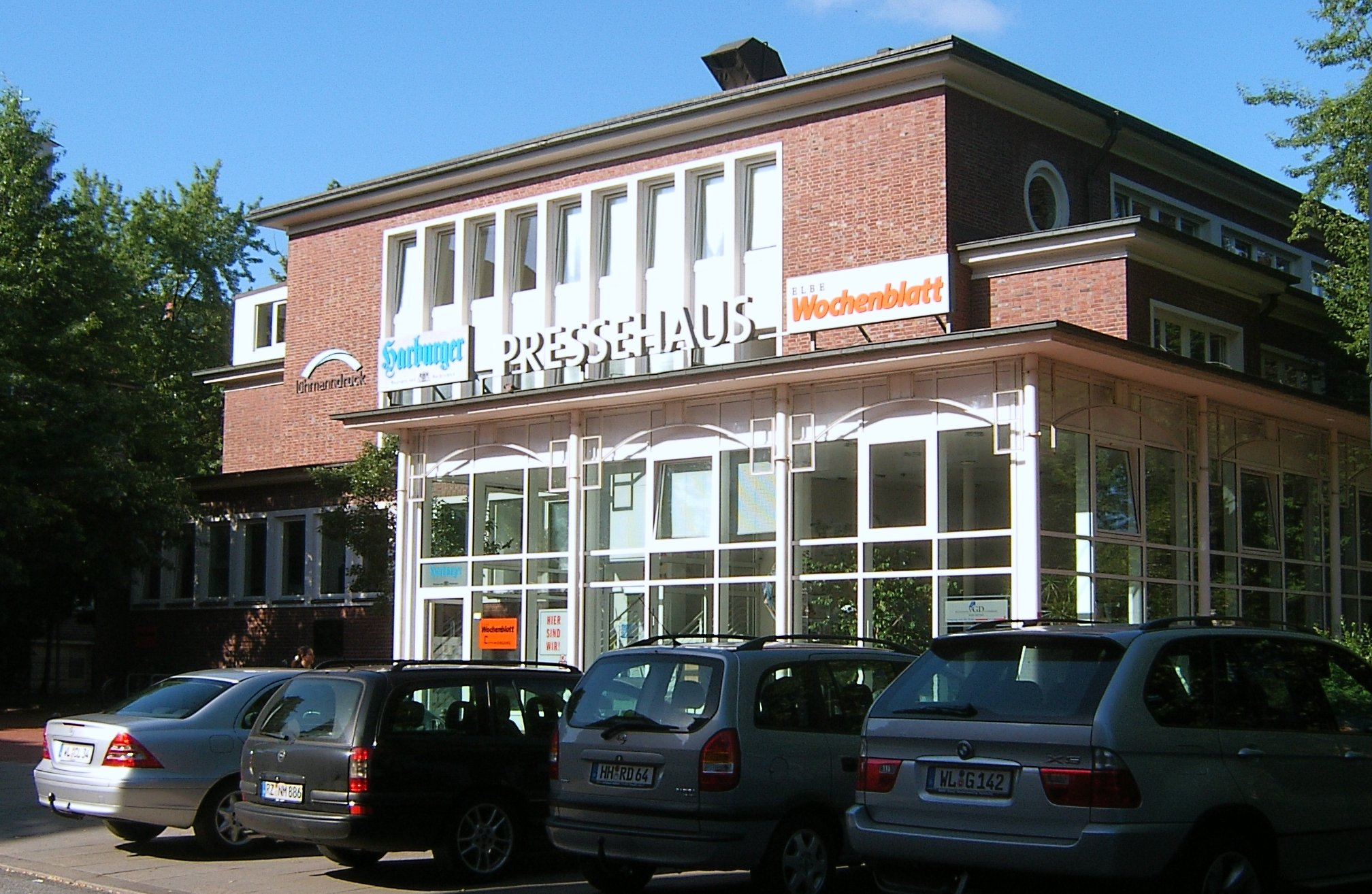 Hamburg, Harburg, Verlagshaus Lühmanndruck